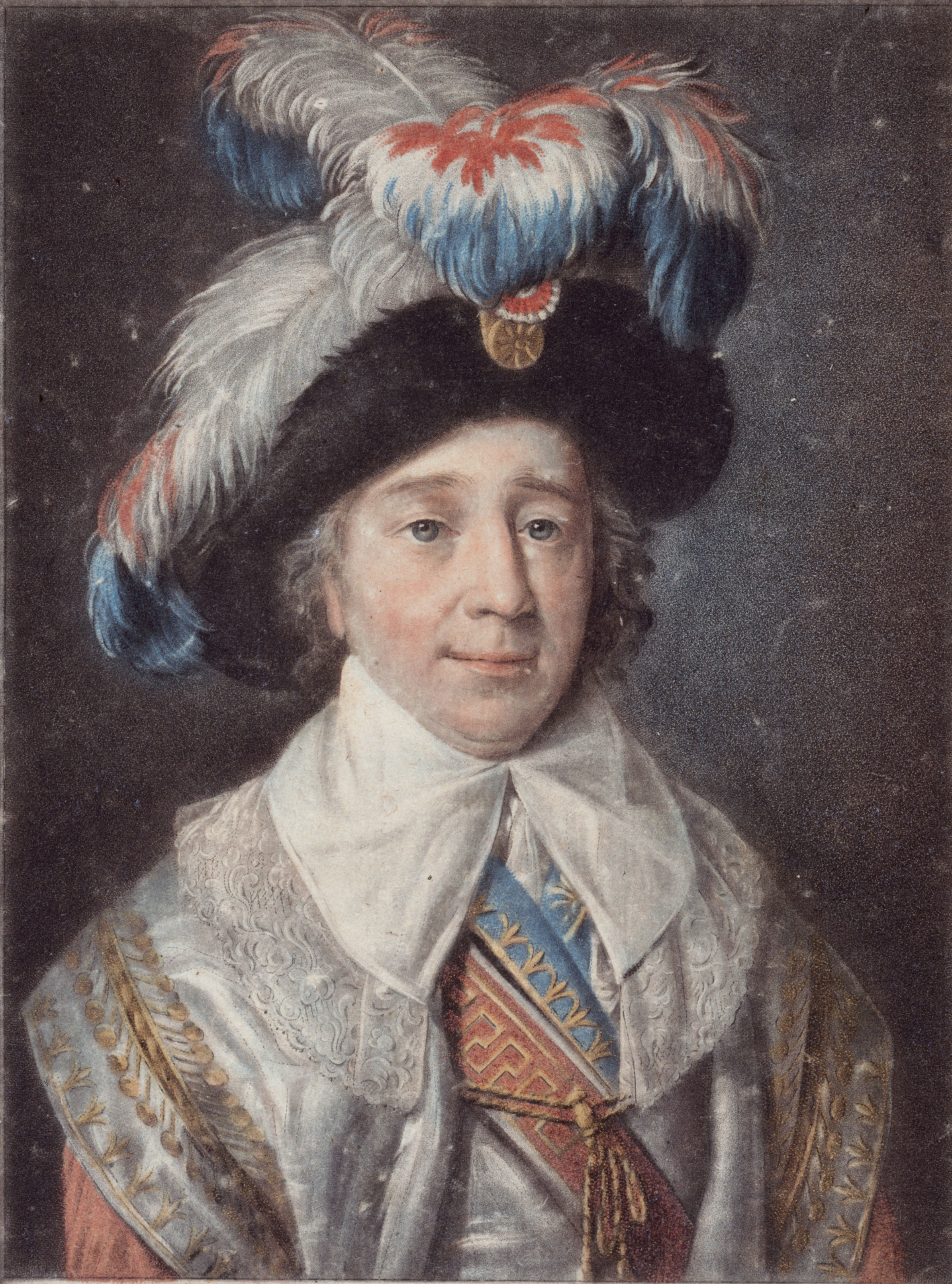 Portrait présumé de Paul Barras en grand costume de Directeur. En buste de face dans un encadrement avec des faisceaux de chaque côté.